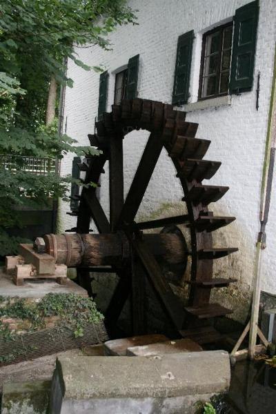 Mühlrad der Schrofmühle in Wegberg-Rickelrath